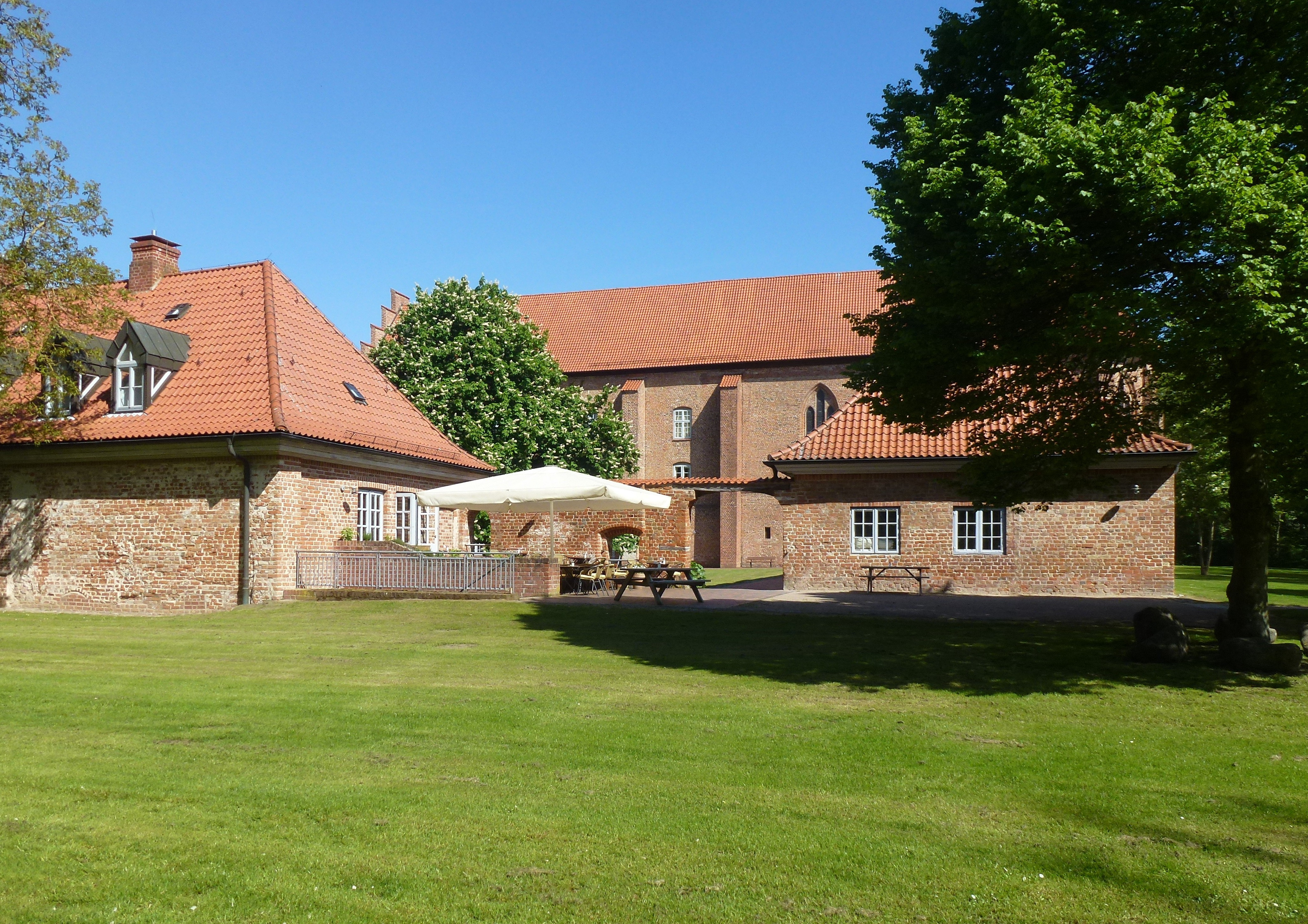 Kloster Cismar